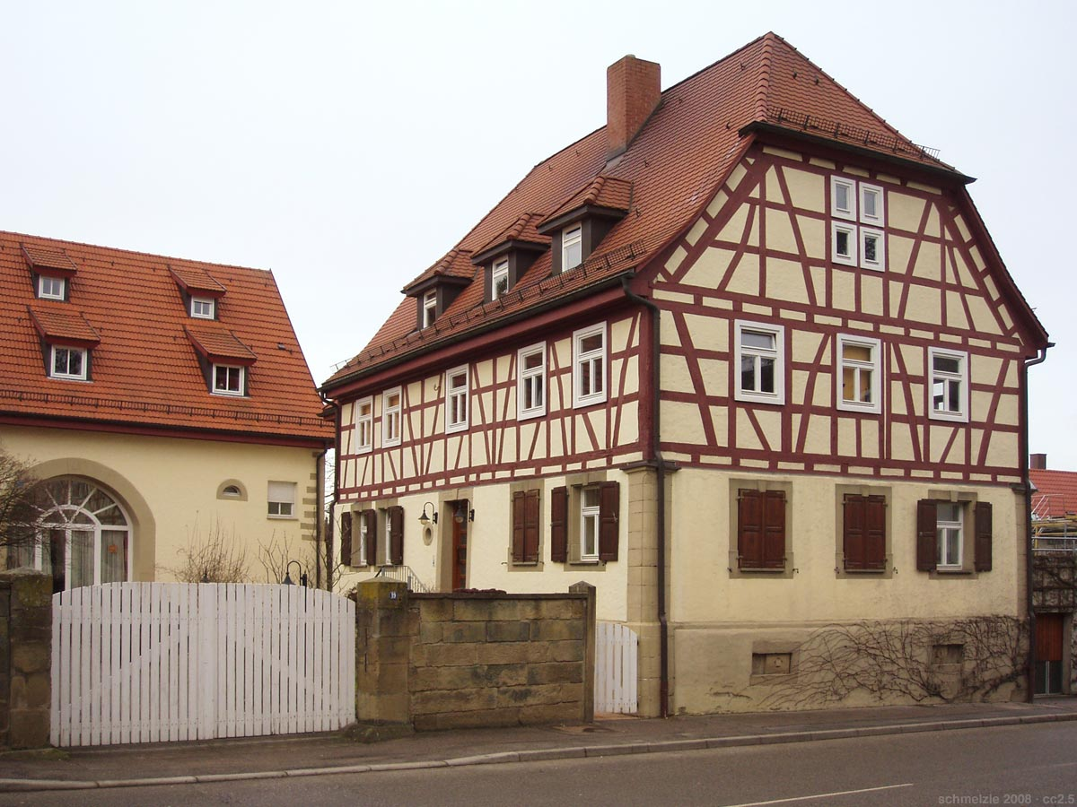 Fachwerk-Anwesen Hauptstr. 19 (Hauptgebäude 1810) in Siegelsbach